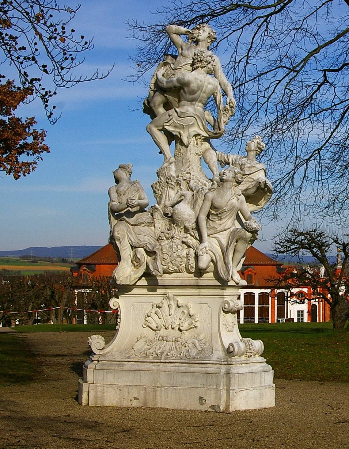 Schloss Seehof - Park - Tietz-Skulptur 1